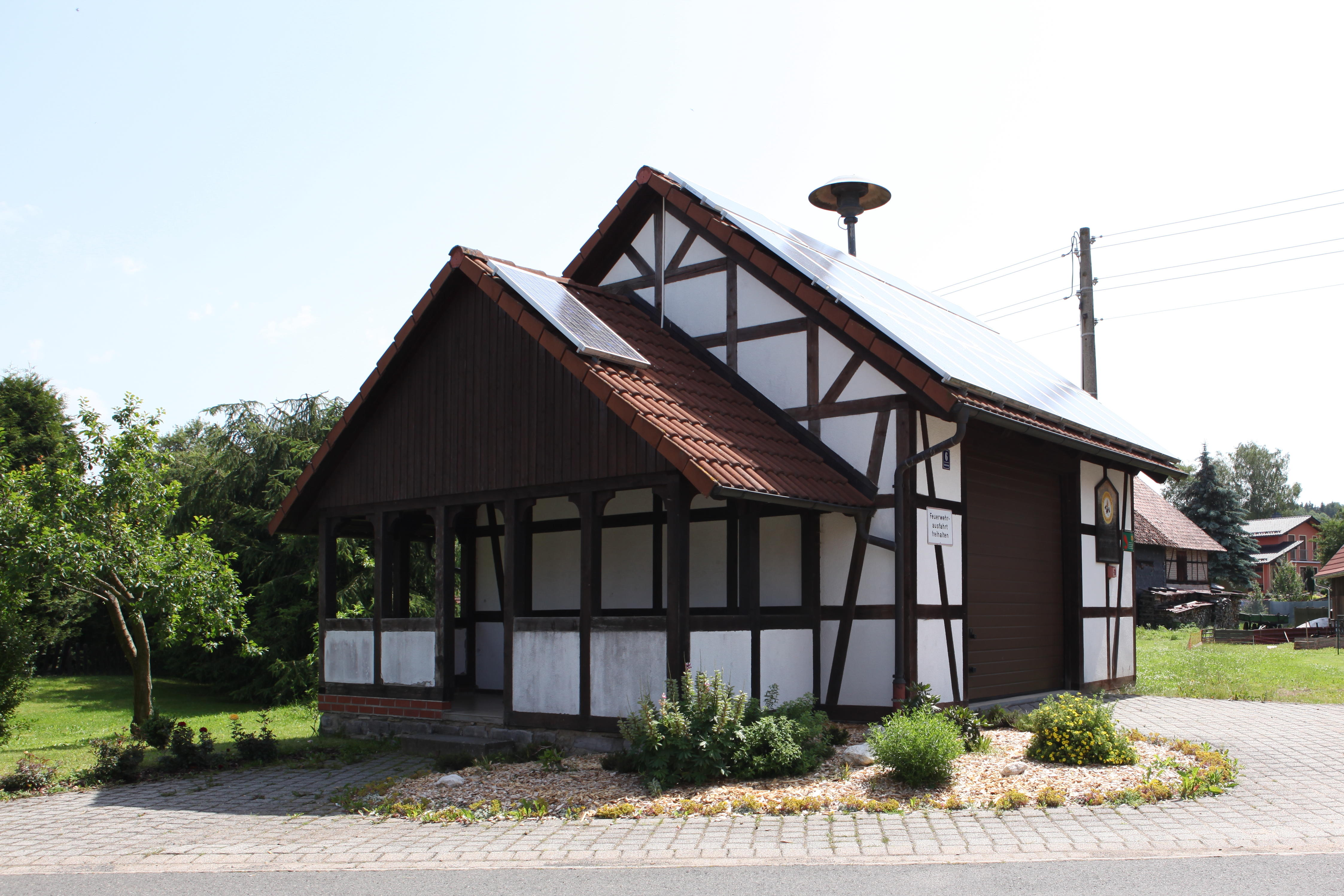 Feuerwehrhaus in Herbartswind, OT von Bockstadt, Thüringen